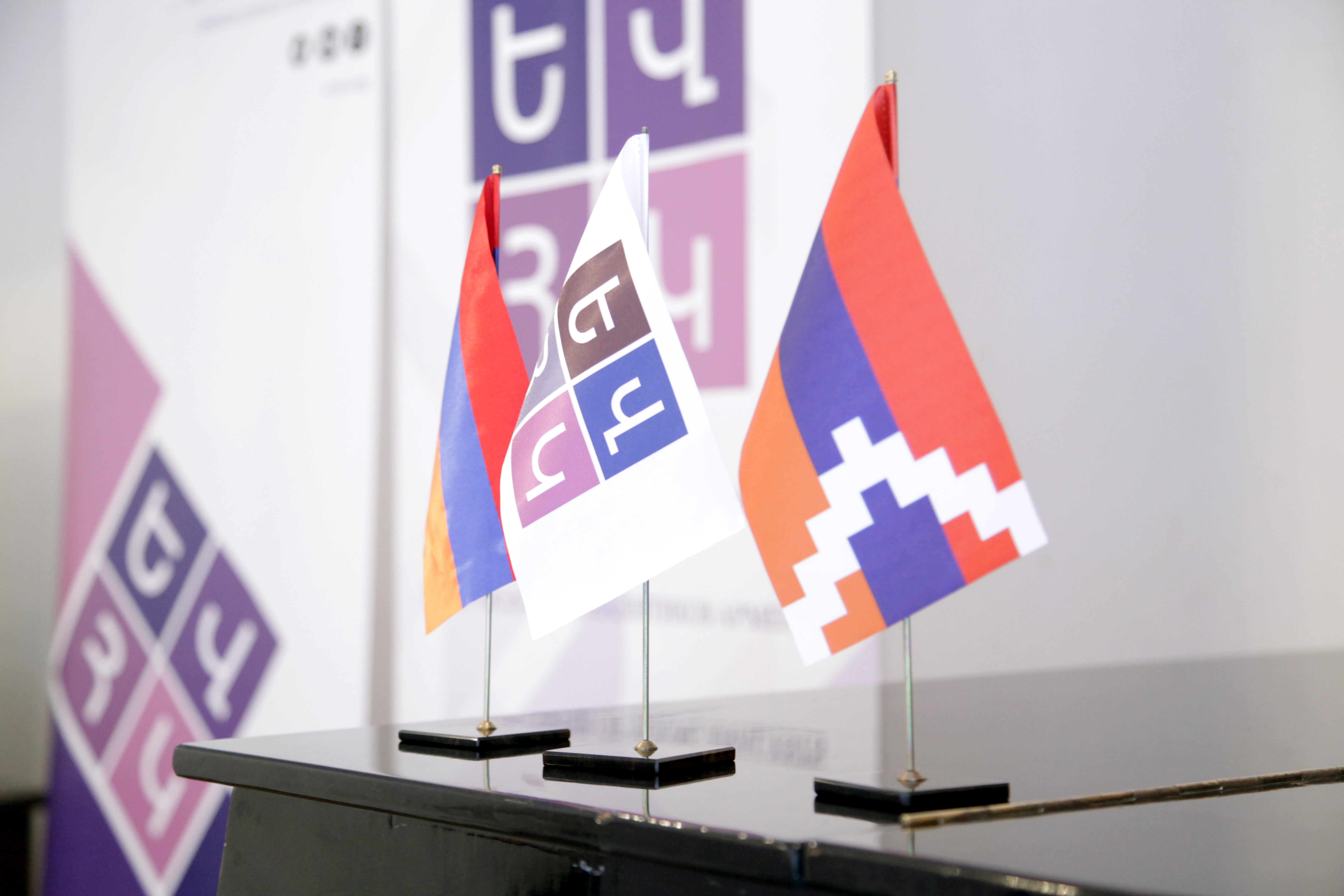 ԵՎՀԿ